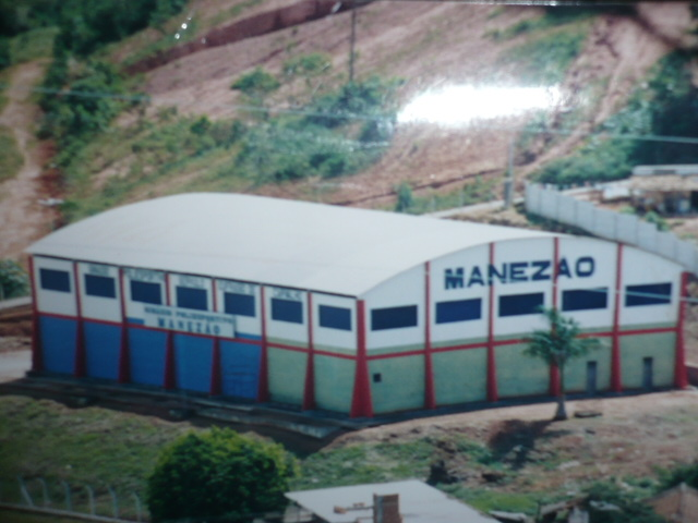 Ginasio Poliesportivo, Sérvulo Eufrasio de carvalho (Manezão) ginásio inaugurado na gestão do prefeito Manoel Eufrasio de Carvalho, no ano de 1992